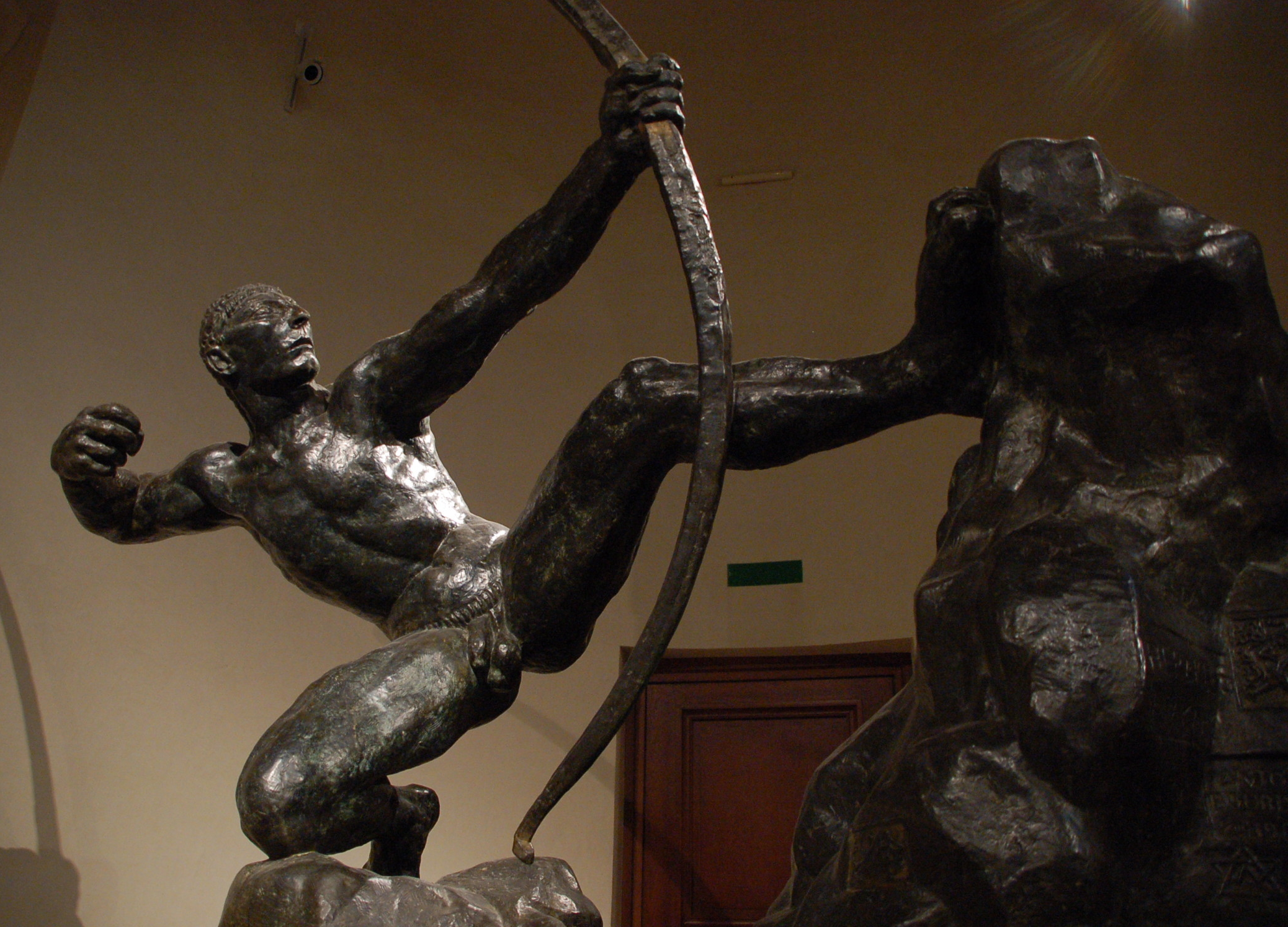 Musée des Beaux-Arts de Lyon Antoine Bourdelle (Montauban, 1861-Le Vésinet, 1929) Bronze Acquis de l'artiste en 1927 Inventaire B-1464